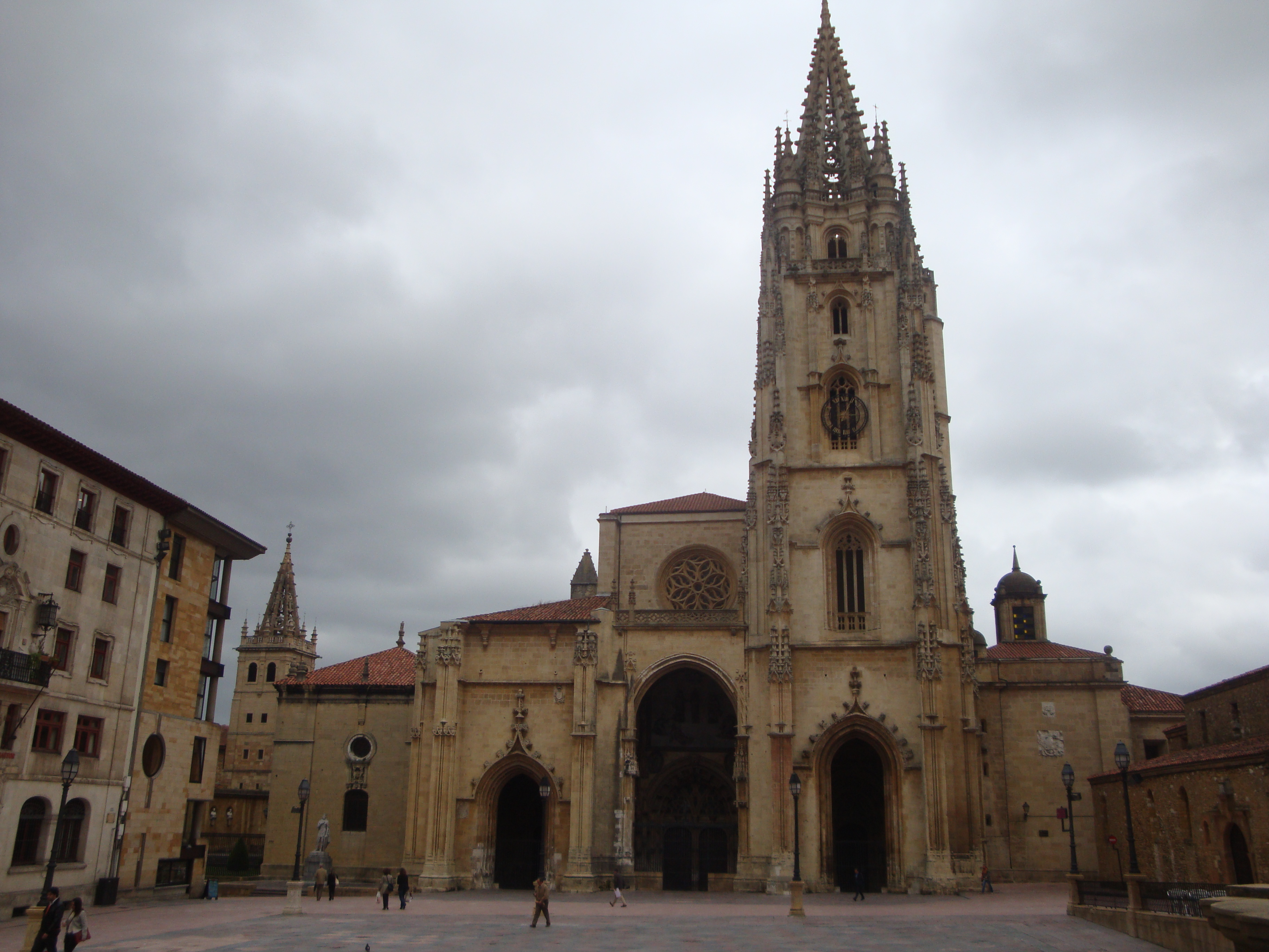 Vista de la fachada principal de la catedral de Oviedo